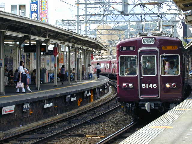 ishibashi-sta